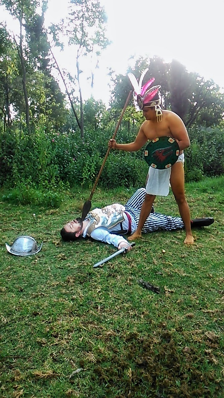 Batalla entre indio y conquistador